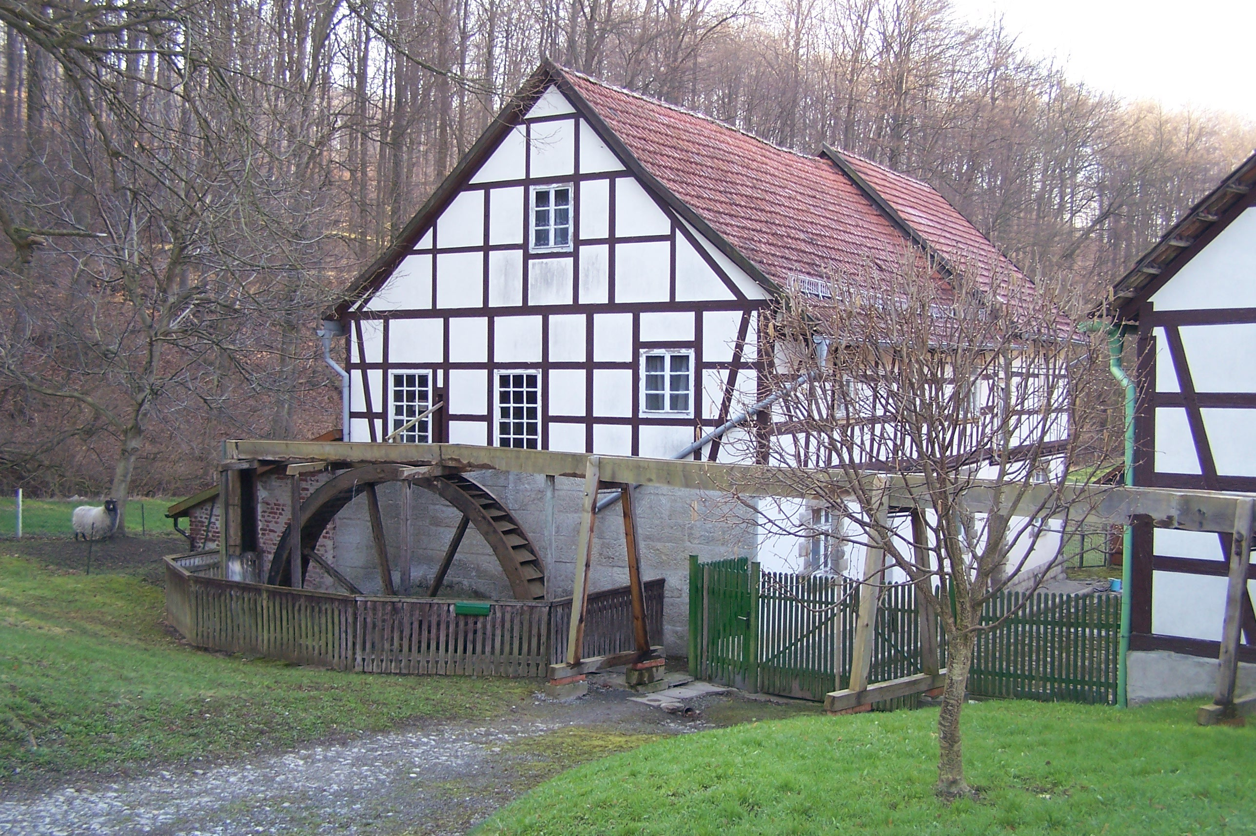 An der Obermühle bei Heyerode im Obereichsfeld.